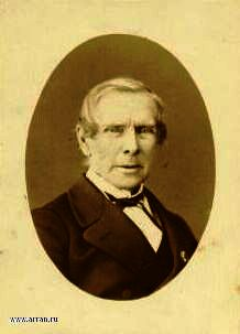 Степан Алексеевич Маслов (1793—1879) — русский писатель и деятель сельского хозяйства.